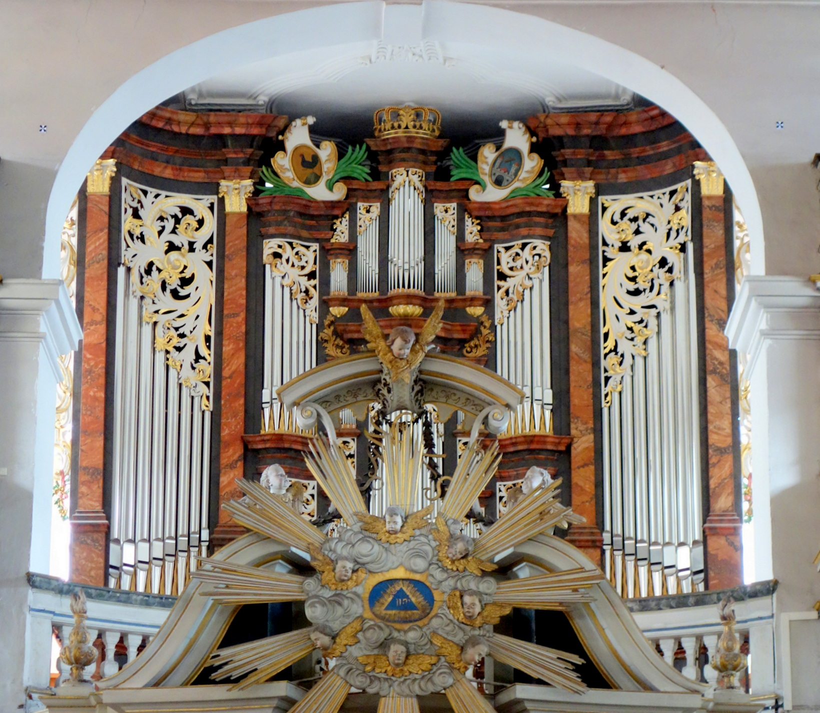 Kreuzkirche Suhl, Thüringen, Deutschland